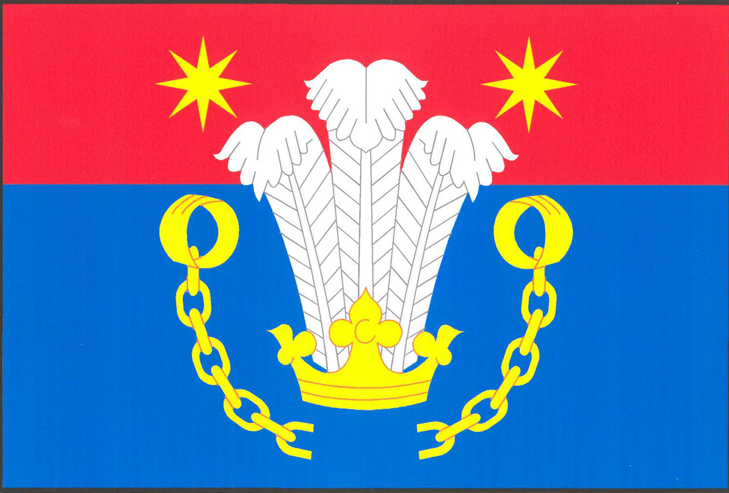 Vlajka obce Tuřany (okres Kladno)